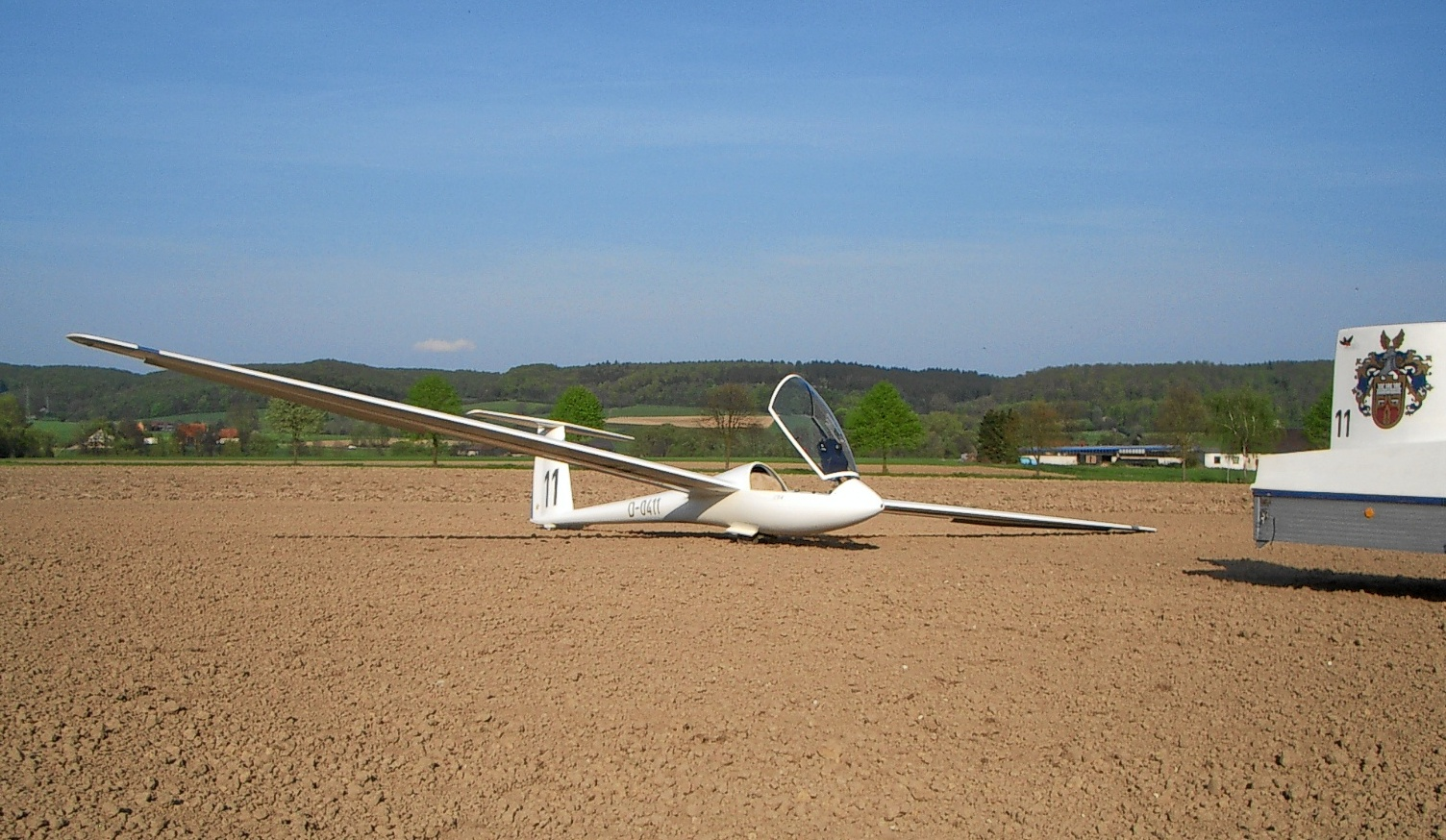 LS-4 (D-0411) nach einer Außenlandung